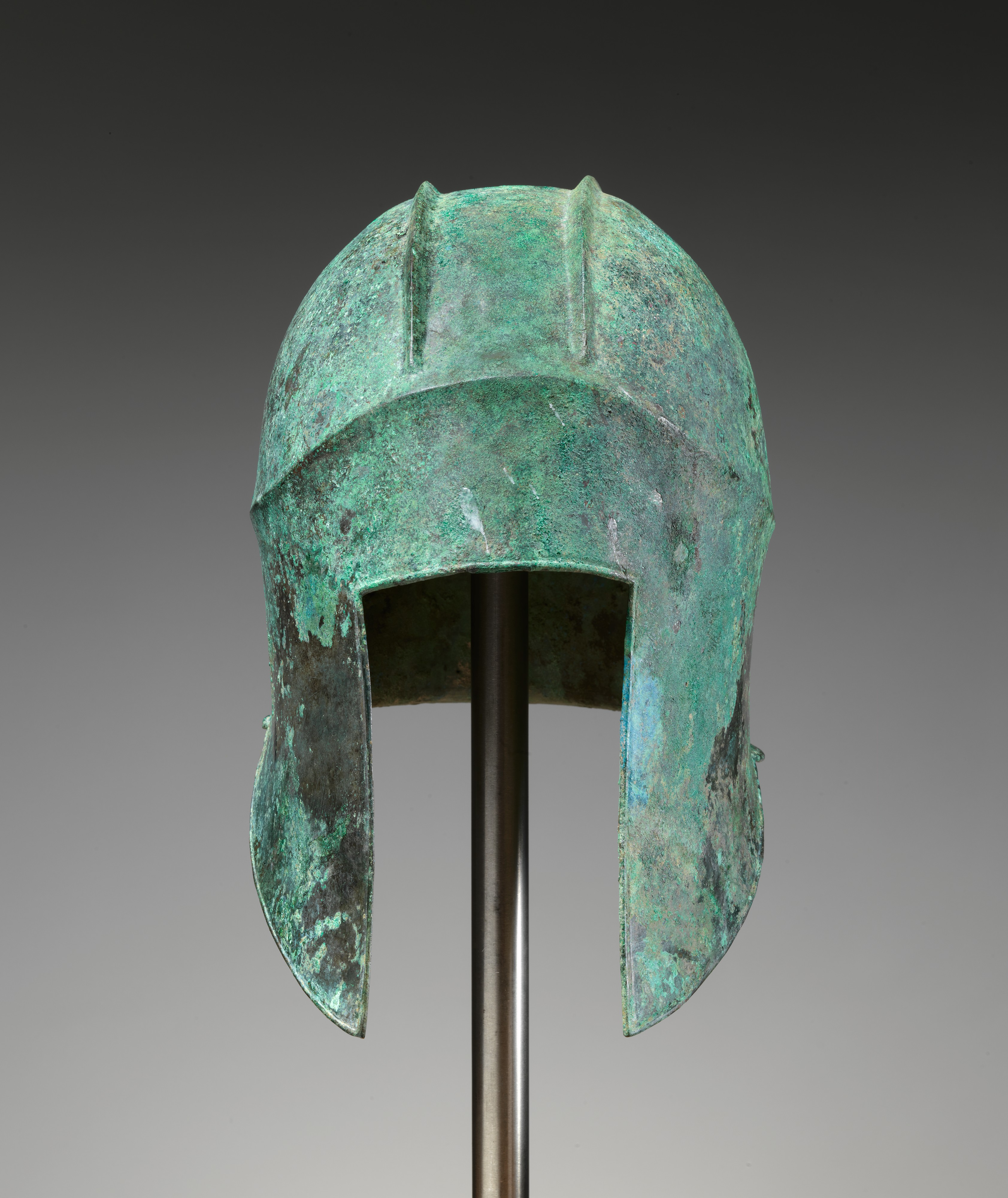 Greek; Helmet; Bronzes